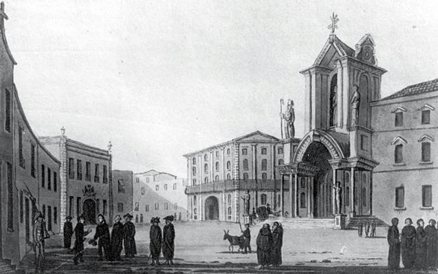 Disegno con l'antica facciata normanna del Duomo siracusano.